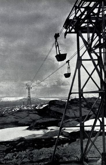 Taubane for kobbermalm mellom Skorovas og Kongsmoen.